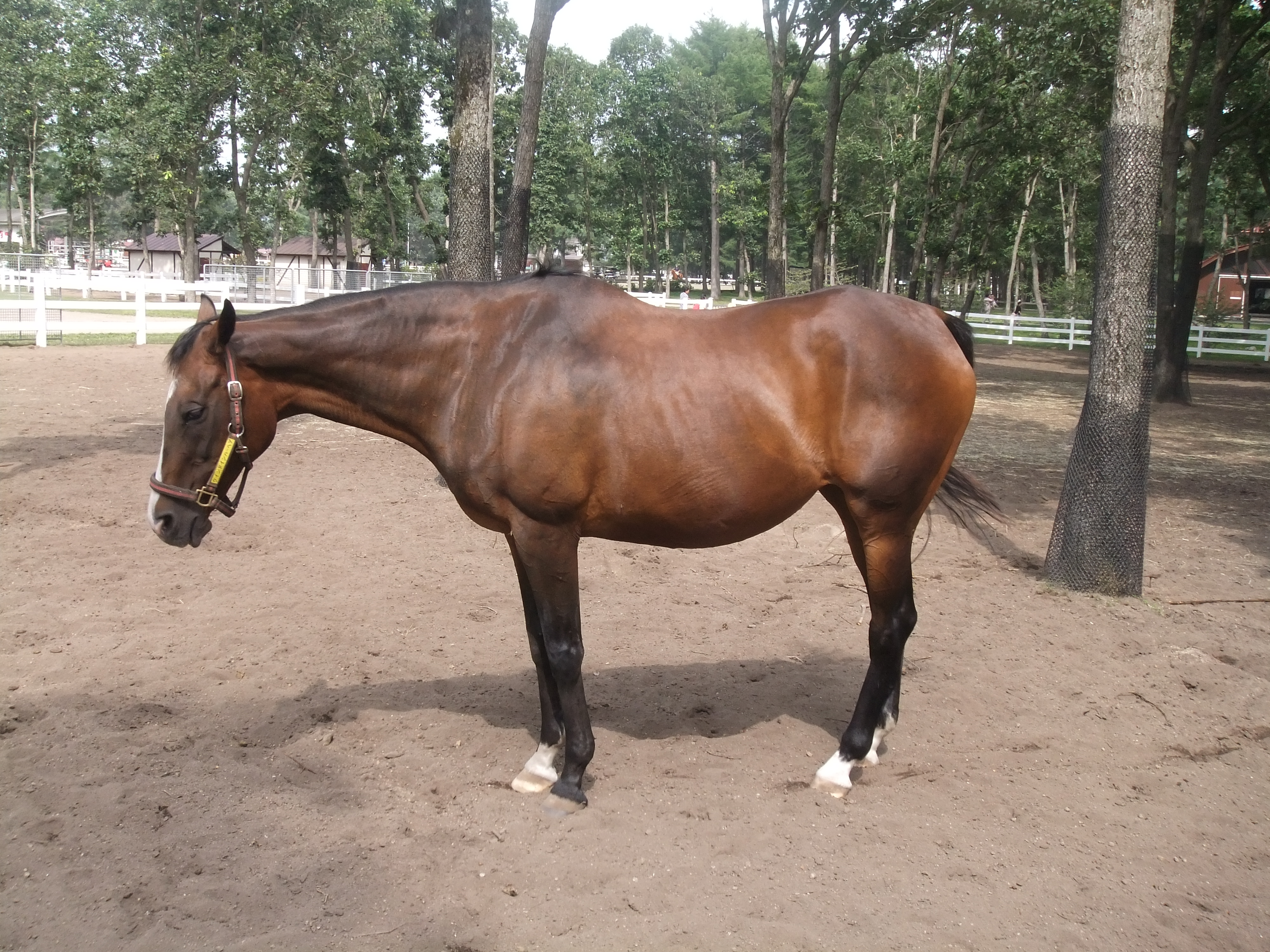 2014年8月3日、ノーザンホースパークにて